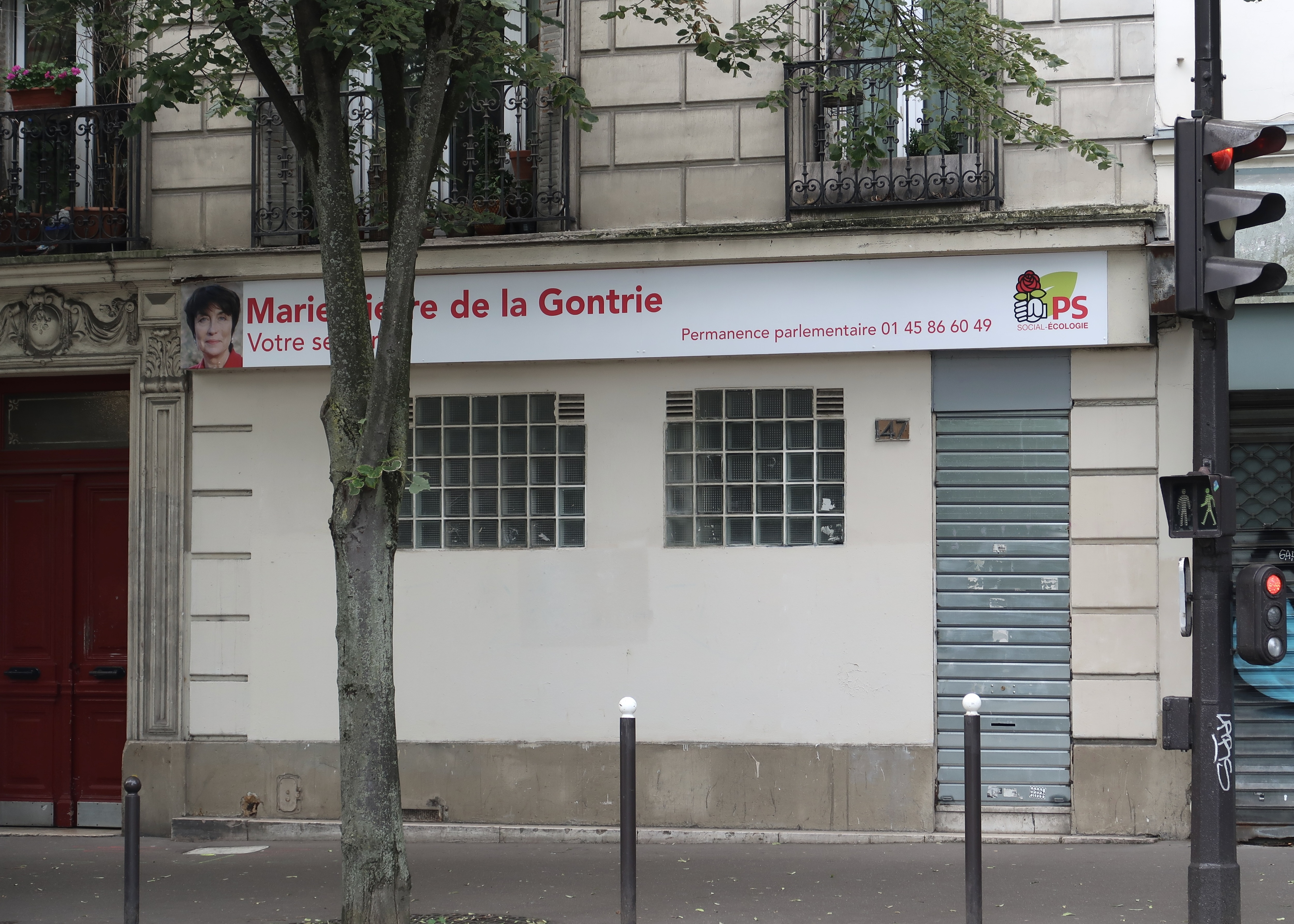 Permanence parlementaire de Marie-Pierre de la Gontrie, n°147 avenue de Choisy (Paris, 13e). Ancienne permanence de Jean-Marie Le Guen puis de Martin Lagane (avec Jérôme Coumet) pour les élections législatives de 2017 "La Gauche de la majorité présidentielle".